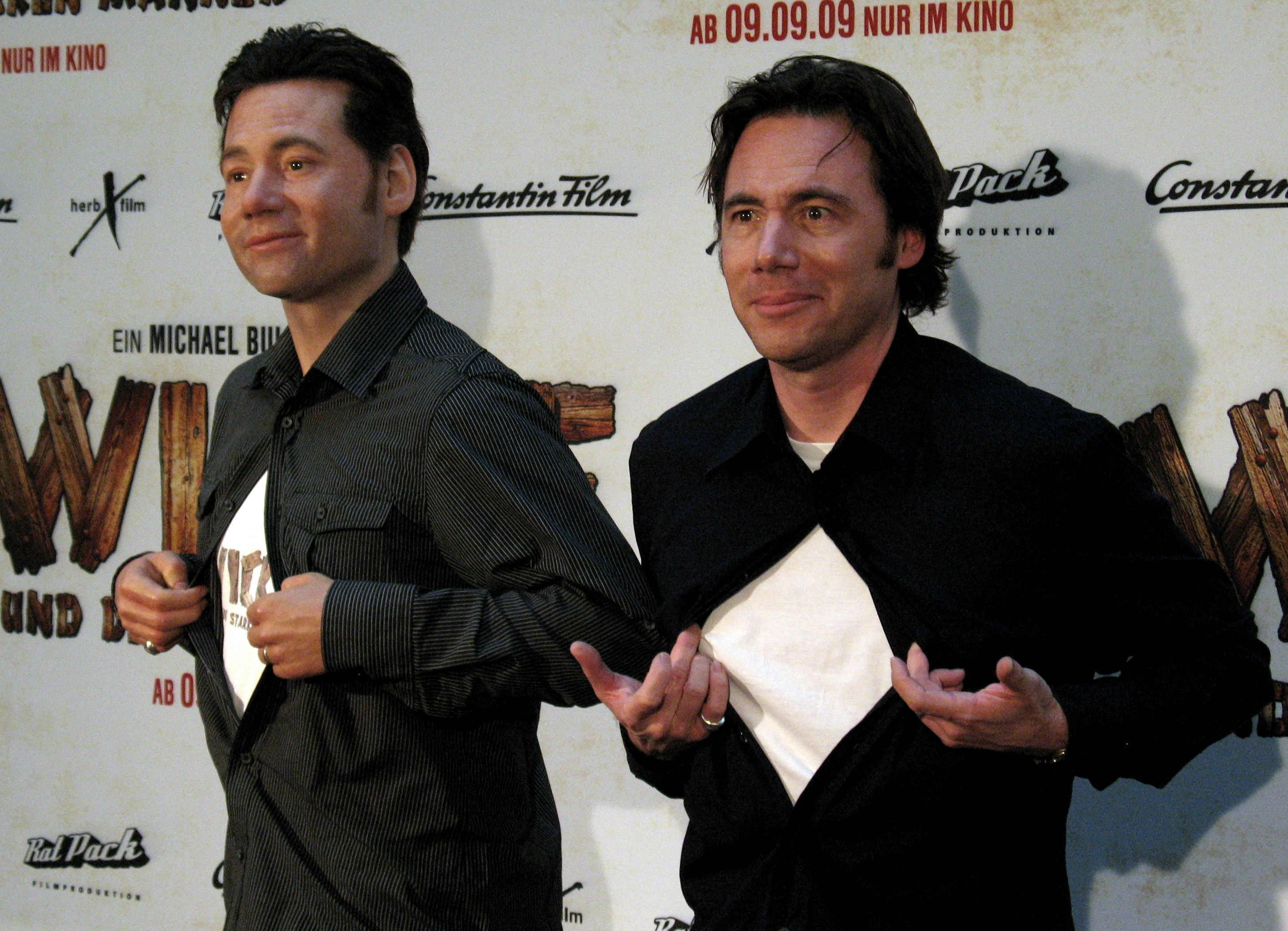 Michael Herbig mit Madame Tussauds Wachsfigur bei der Pressekonferenz von "Wickie und die starken Männer", 03.08.2009